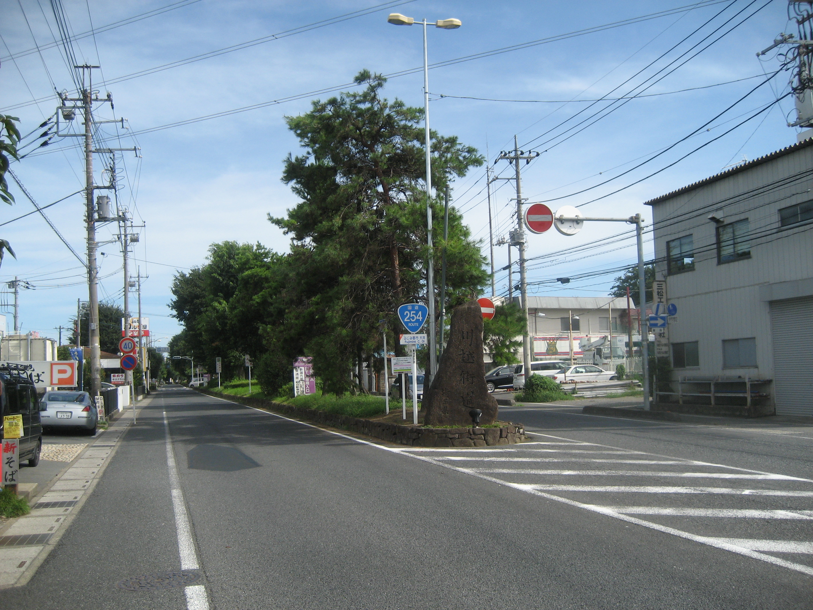 国道254号線埼玉県ふじみ野市大井付近（池袋方面を撮影）